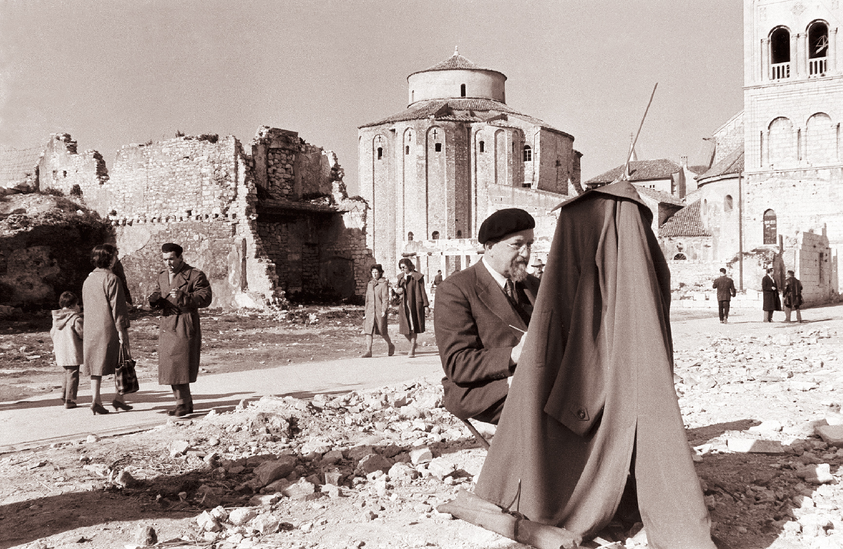 Akademski slikar Božidar Jakac na zadrskem forumu